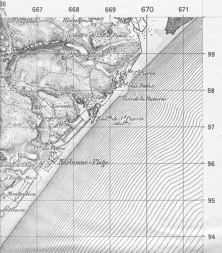 Description: Extrait de la Carte d'Etat-Major au 1:50.000e, avec quadrillage kilométrique, levée en 1860 et révisée en 1937. Ici: Secteur de Narbonne, Aude, France. (Carte originale scannée) Source: Hugo SoriaLicence: GFDL Hugo Soria